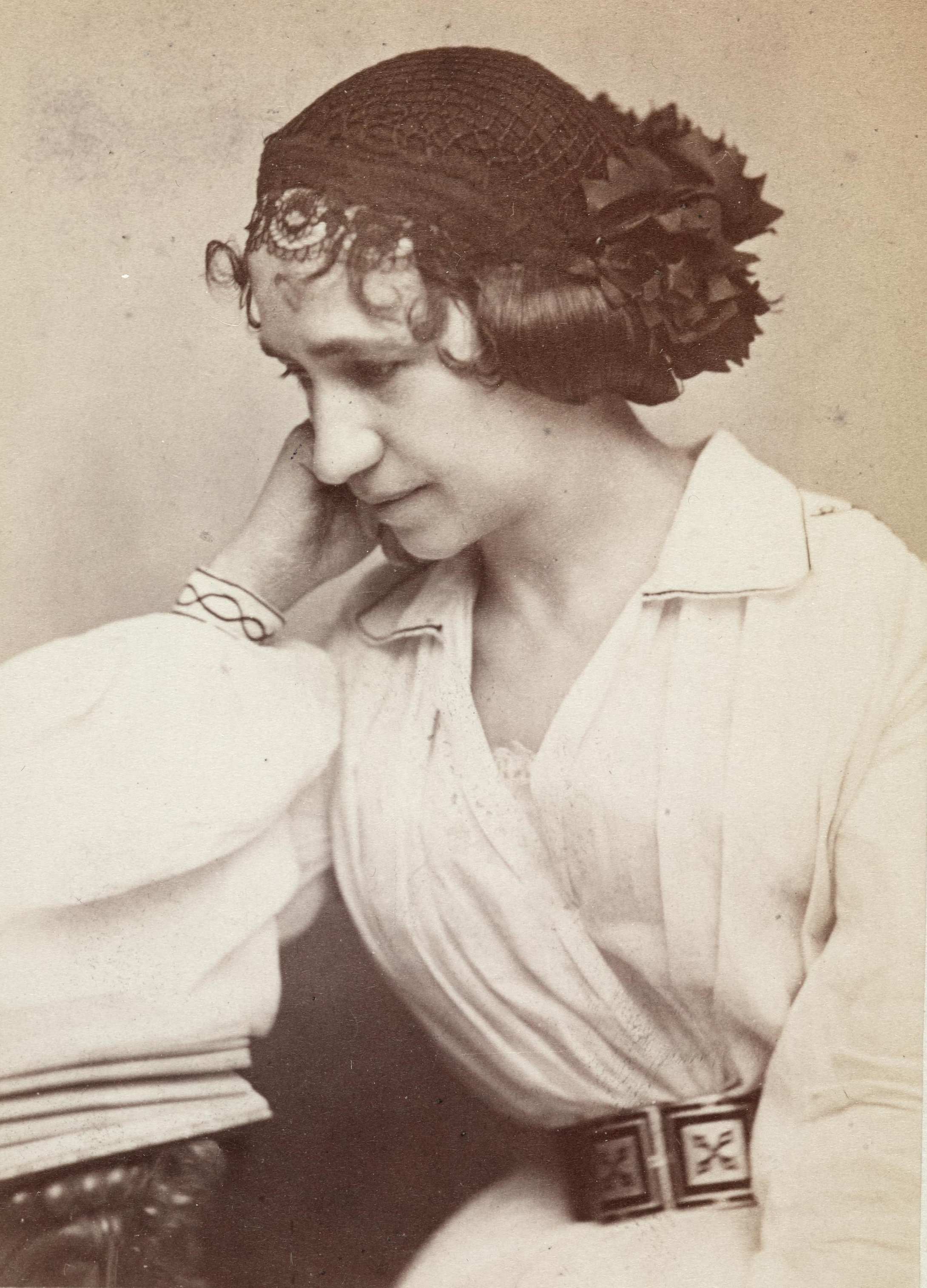 Summary Eins der vielen Bilder der Schauspielerin, die 1890 starb, also gemeinfrei.